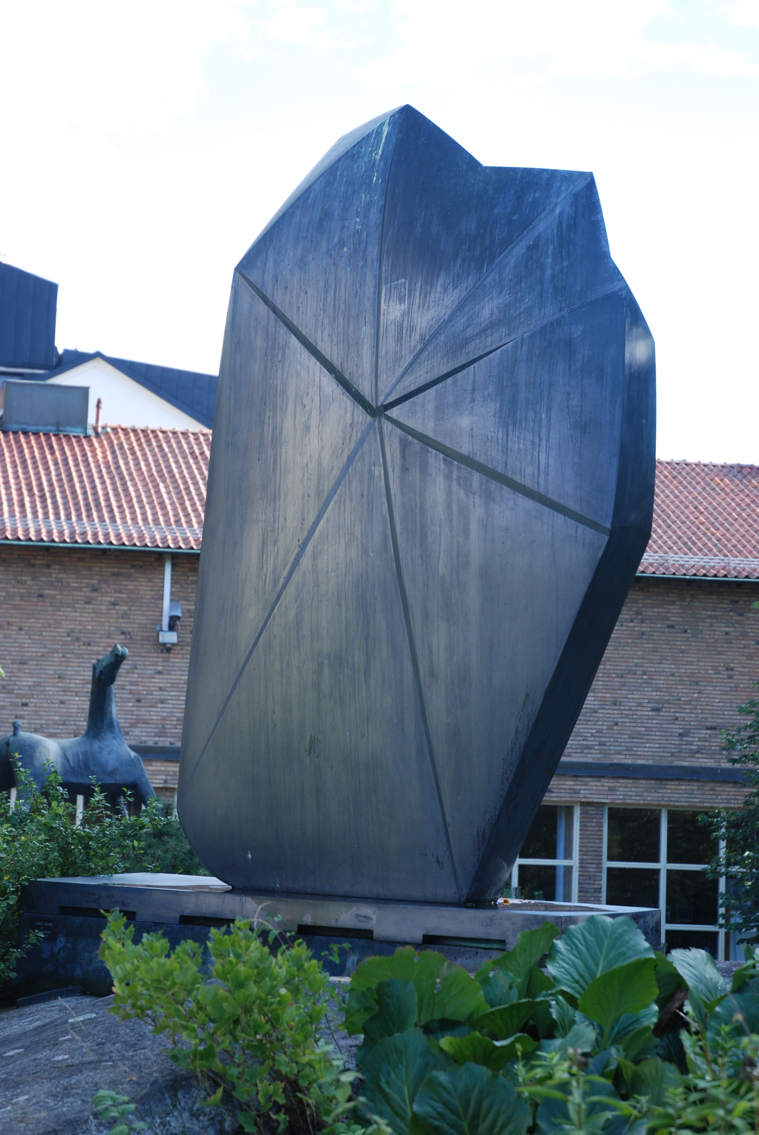 Emile Gilioli´s Klocktorn, Marabouparken, Sundbyberg, sweden